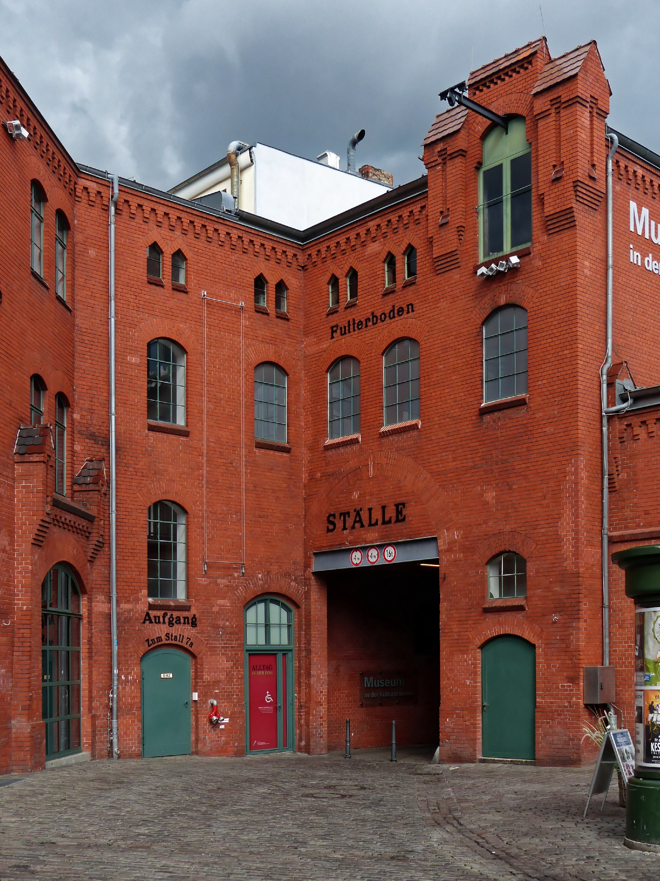 Kulturbrauerei: ehem. Ställe und FutterbodenThis is a photograph of an architectural monument.